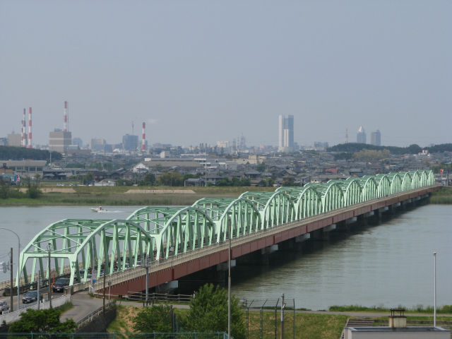 松浜燈台跡より松浜橋を撮影。